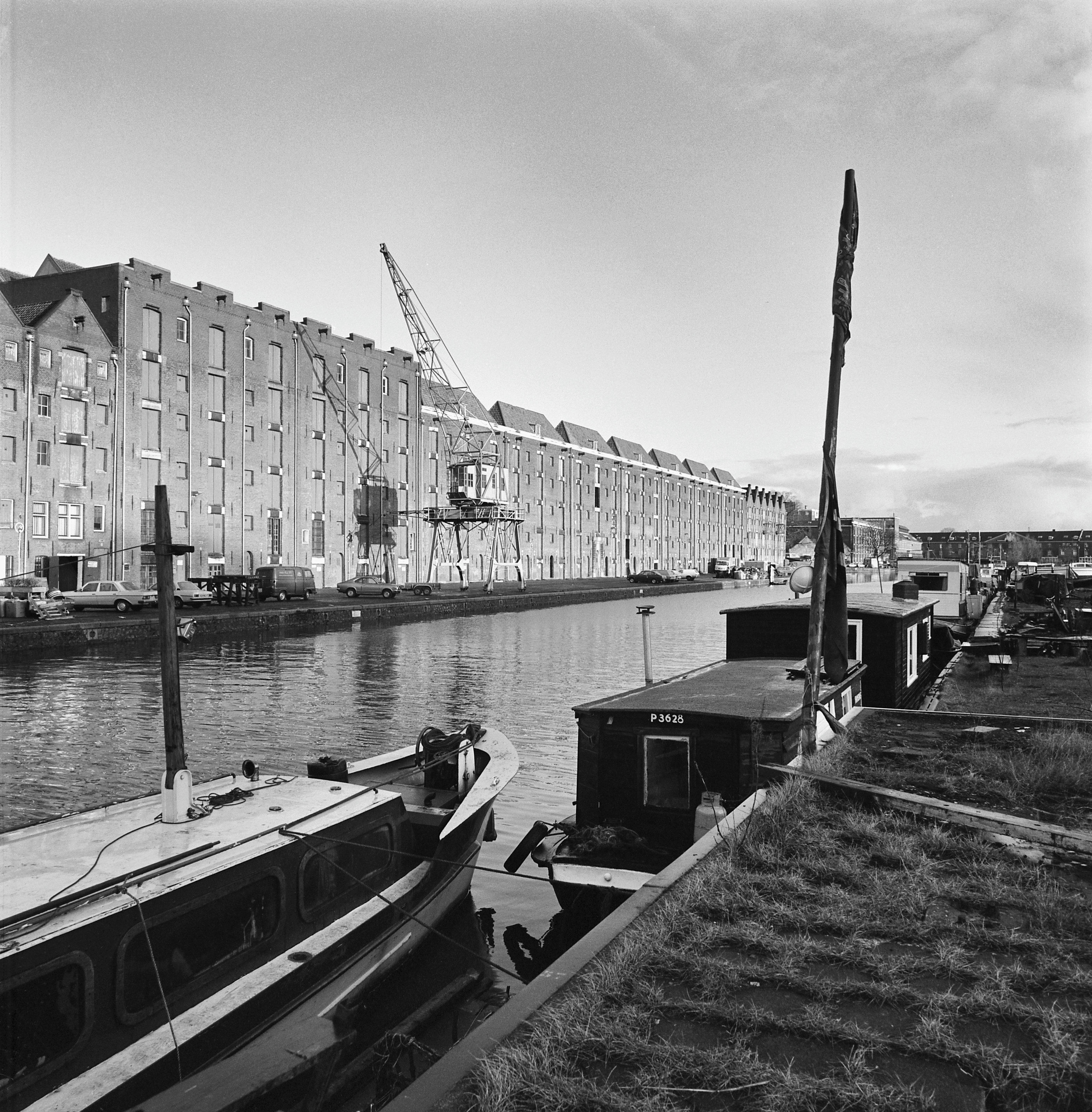 Entrepotdok: overzicht 51-84 This is an image of rijksmonument number 1072 This is an image of rijksmonument number 1073 This is an image of rijksmonument number 1074 This is an image of rijksmonument number 1075 This is an image of rijksmonument number 1076 This is an image of rijksmonument number 1077 This is an image of rijksmonument number 1078 This is an image of rijksmonument number 1079 This is an image of rijksmonument number 1080 This is an image of rijksmonument number 1081 This is an image of rijksmonument number 1082